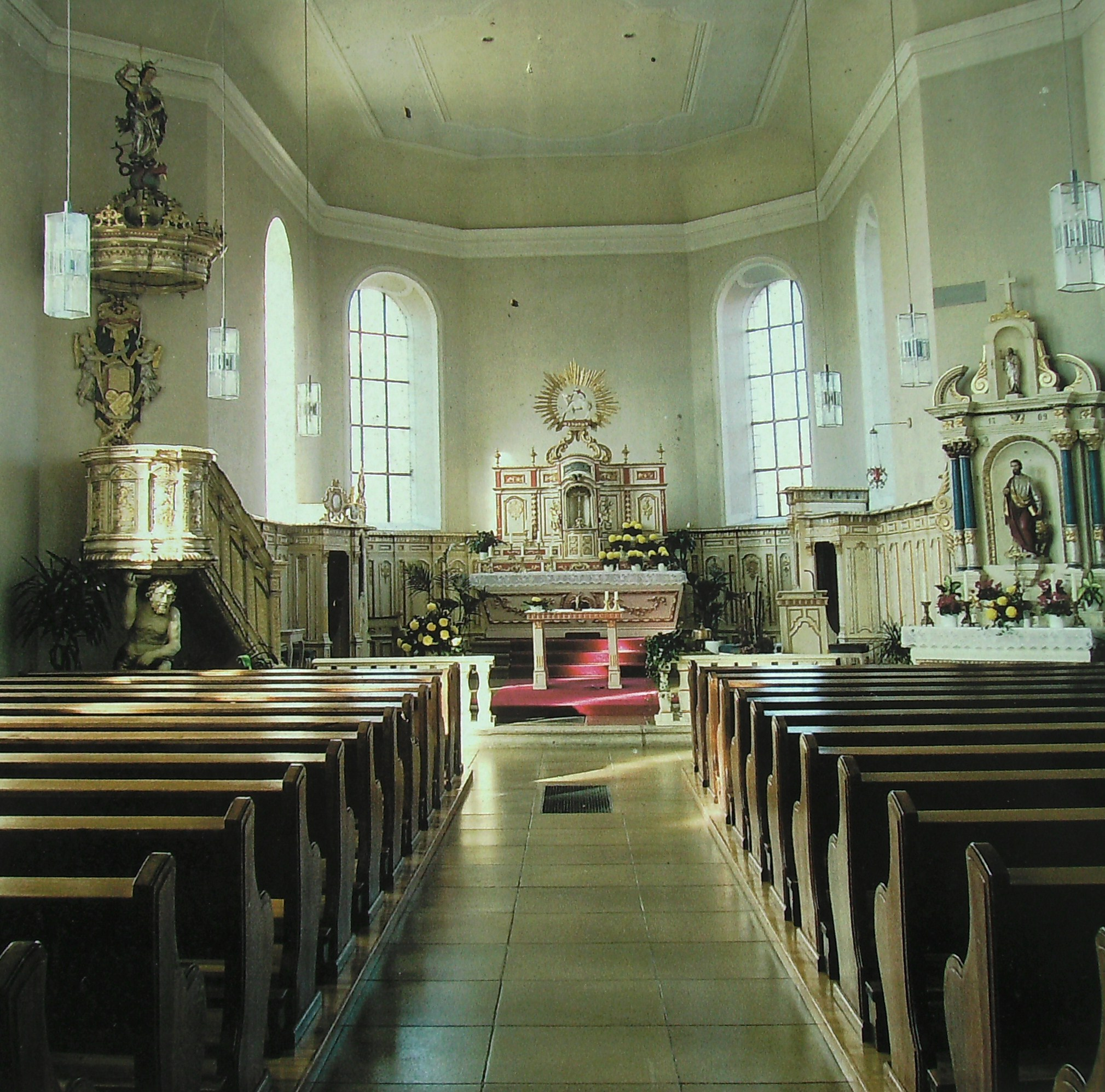 Kirche St. Markus in Gersheim-Reinheim: Innenraum